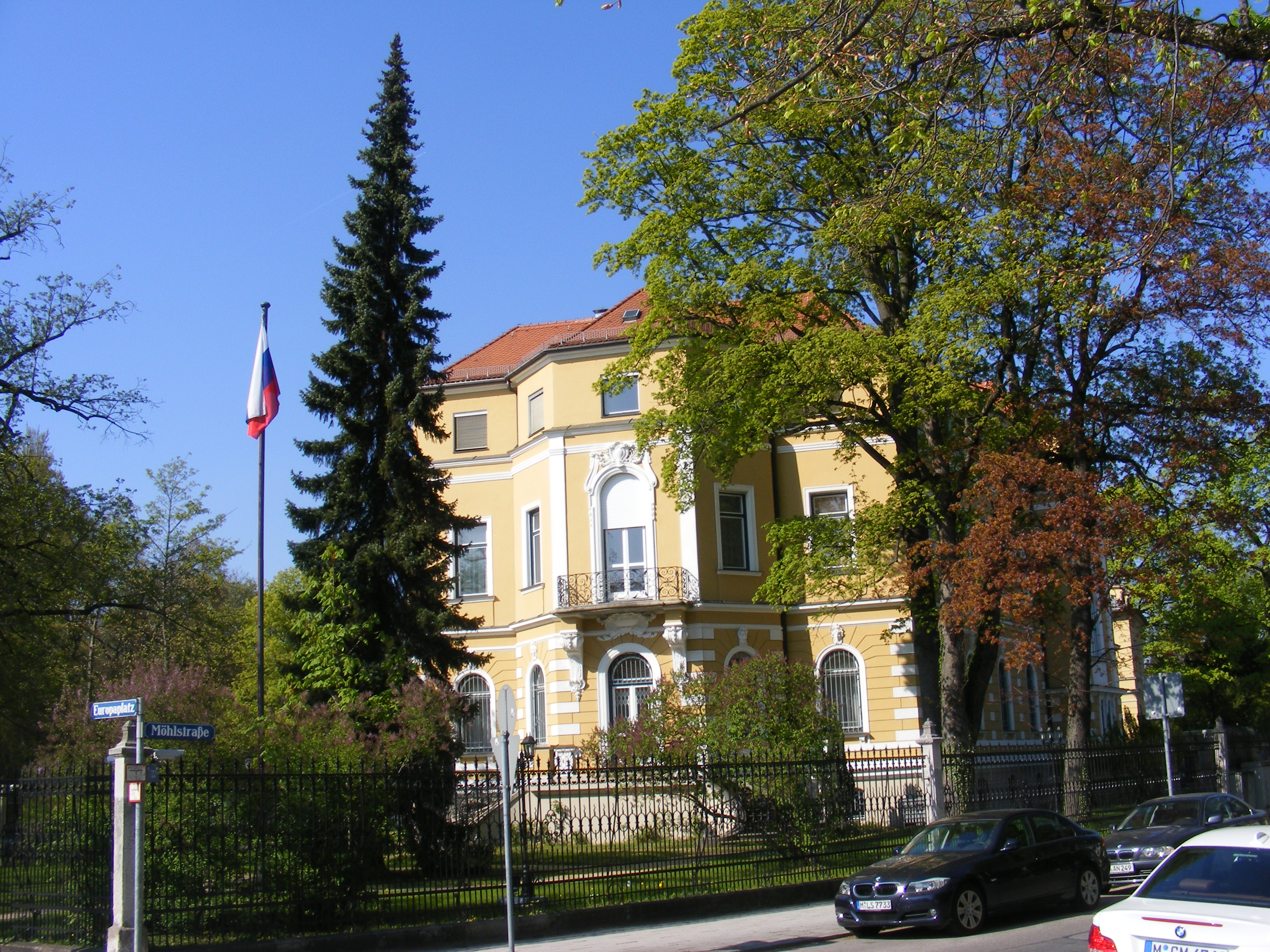 München - Generalkonsulat der Russischen Föderation (Maria-Theresia-Straße 17))